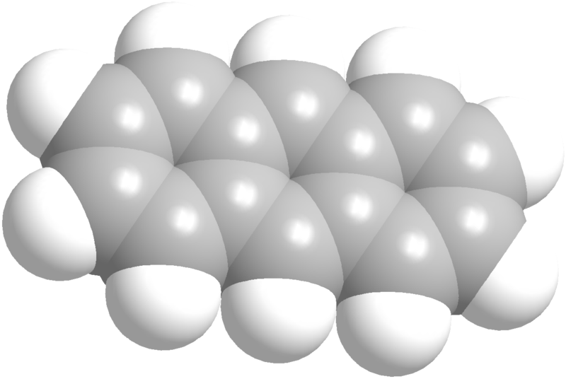 Antrasen 3D